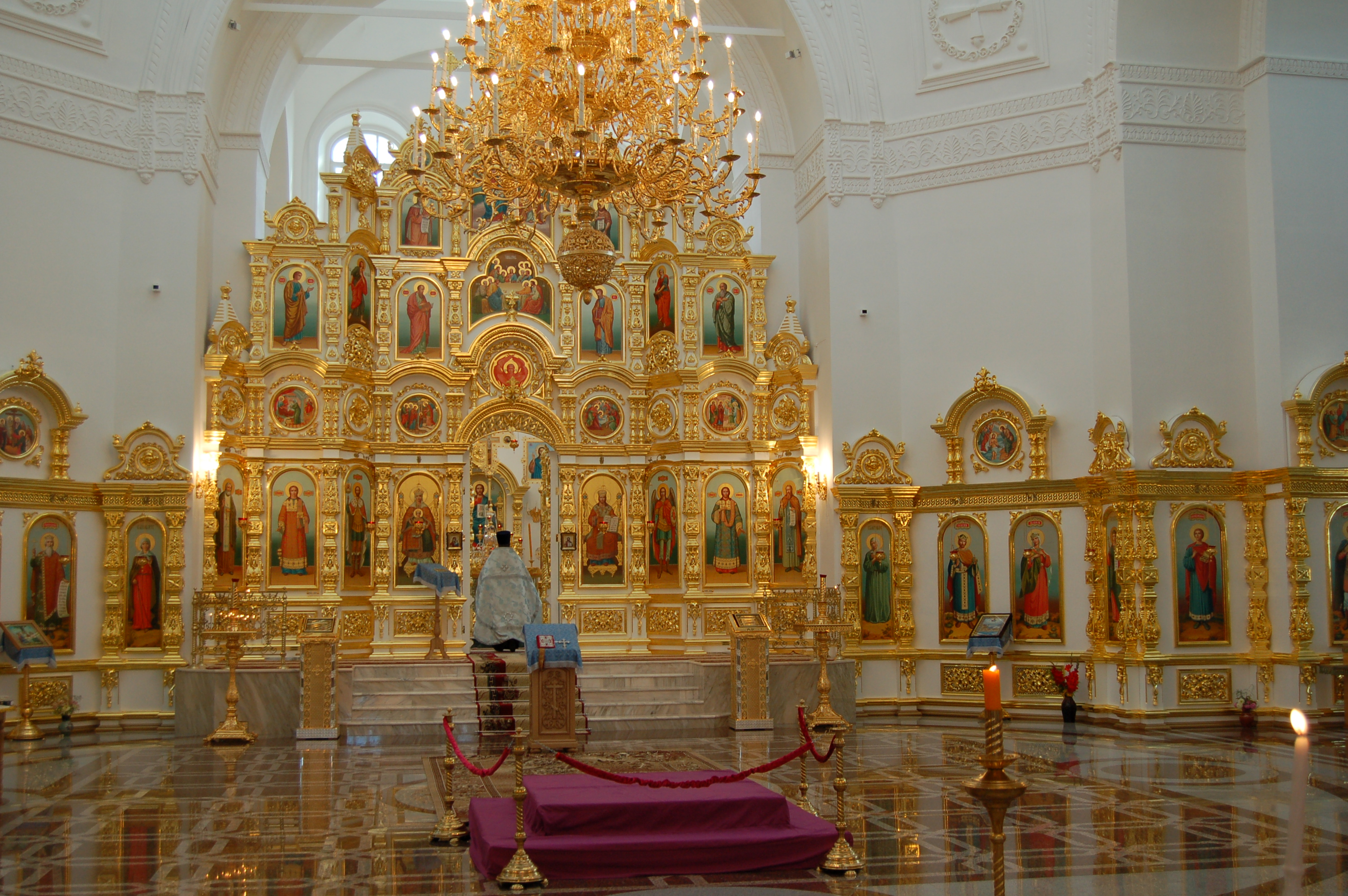 Свято-Михайловский собор в Ижевске